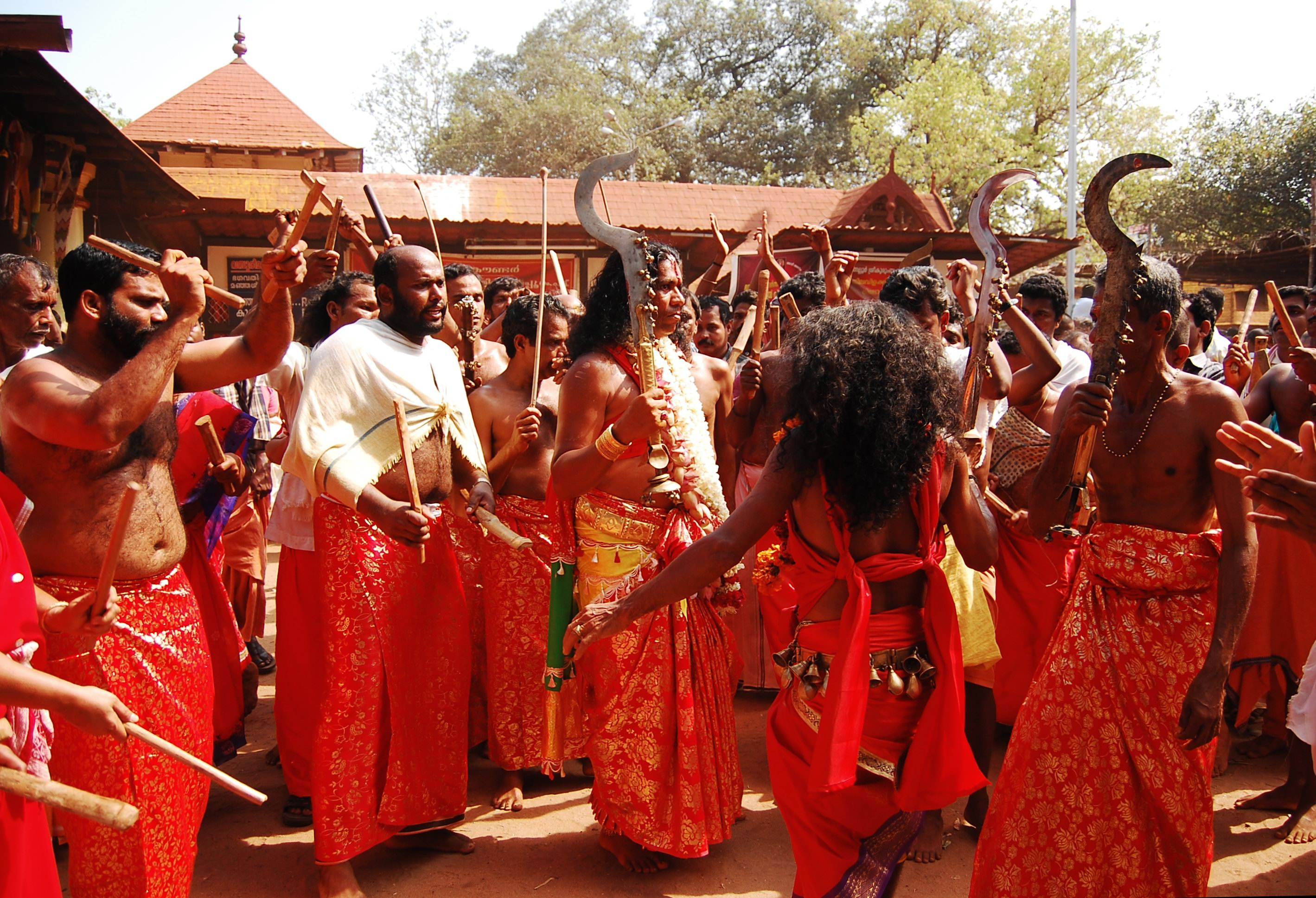 Kodungallur bharani komaram